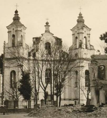 Беларуская (тарашкевіца): Невель (Nieviel), пляц Рынак (plac Rynak). Касьцёл Сьвятога Юрыя